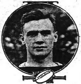 Vanderbilt football player Ammie Sikes